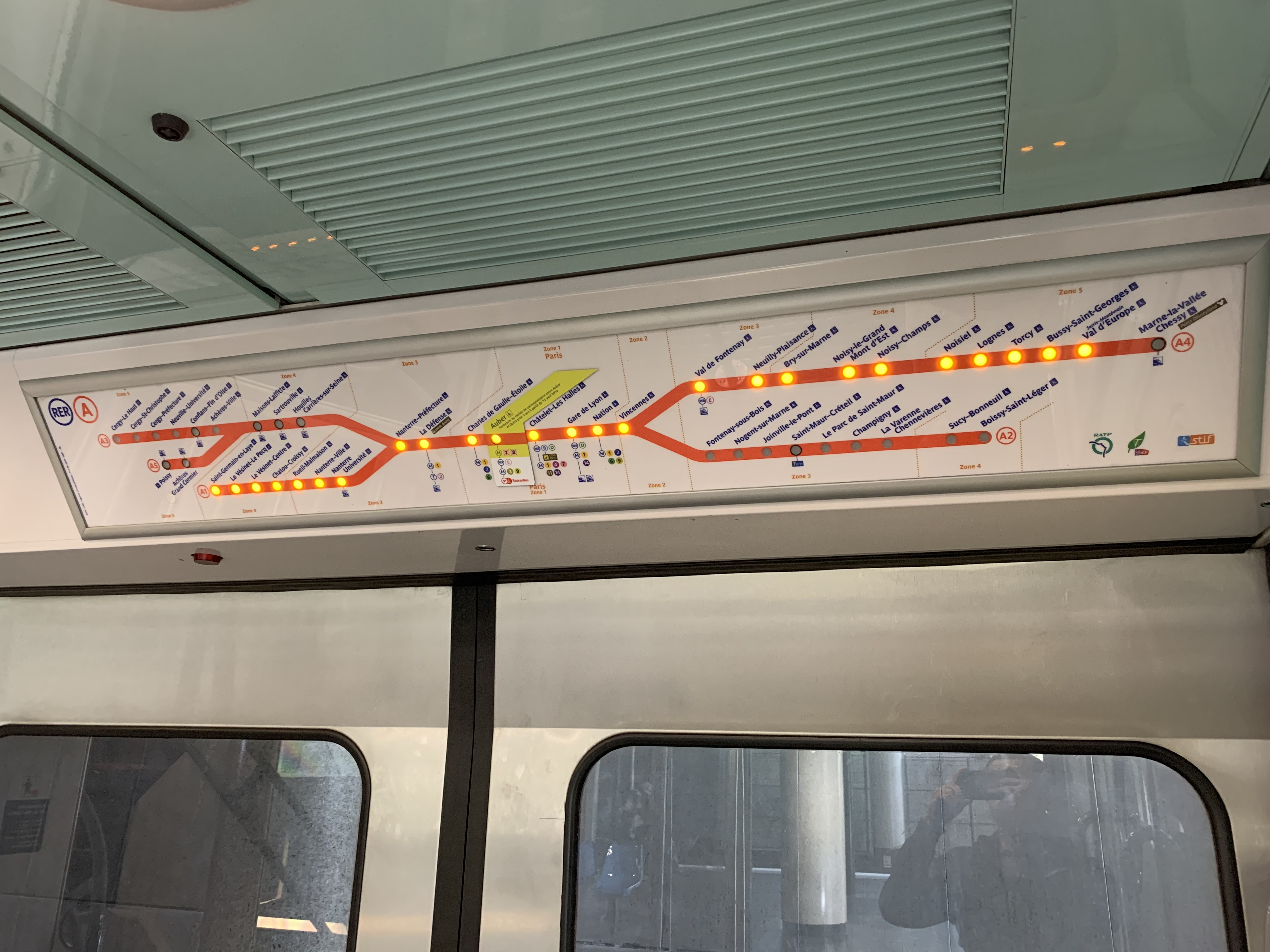 Intérieur d'un MI 09 en gare de Marne-la-Vallée - Chessy, Chessy en Seine-et-Marne.